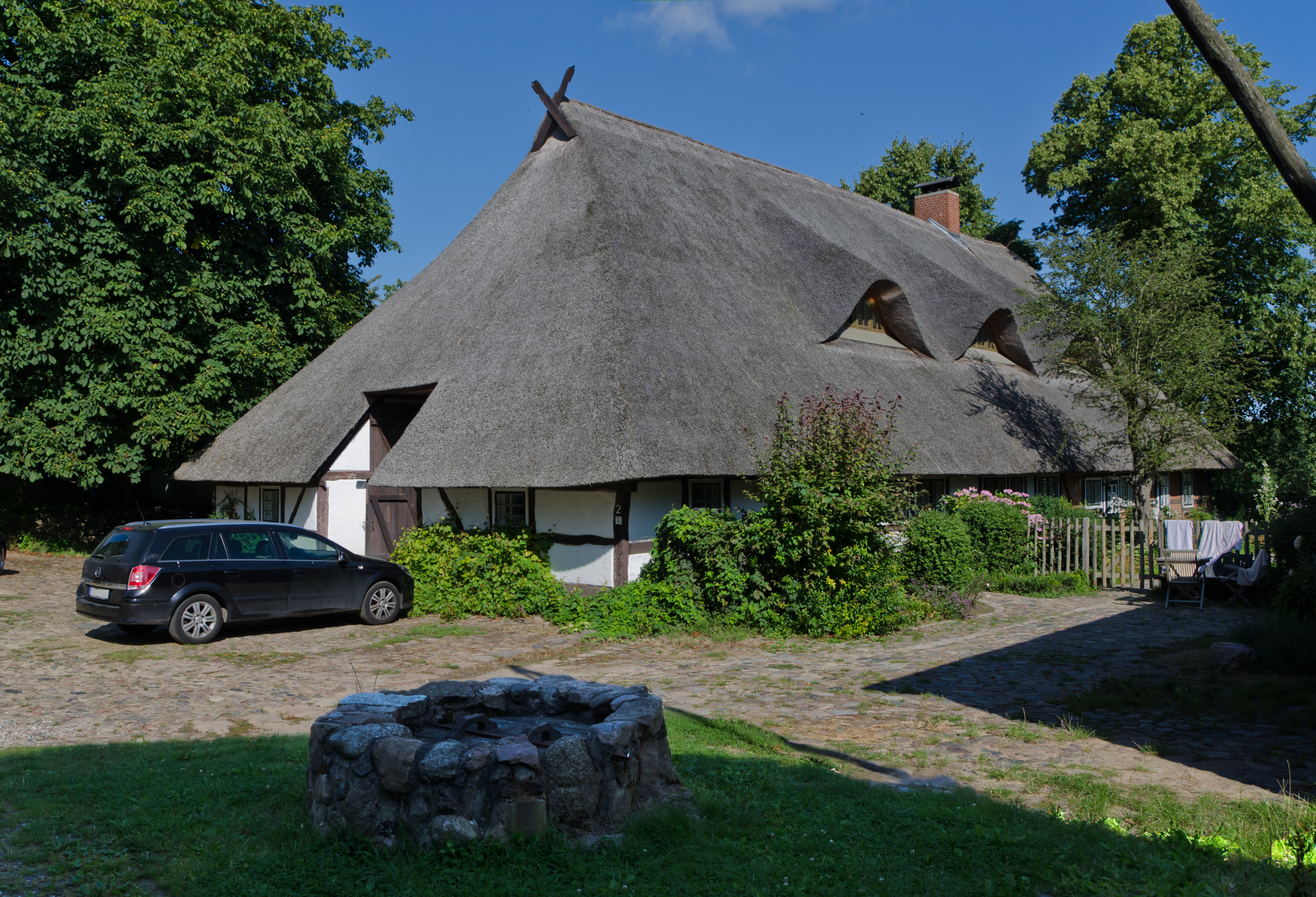 Reddelich Steffenshäger Straße 2